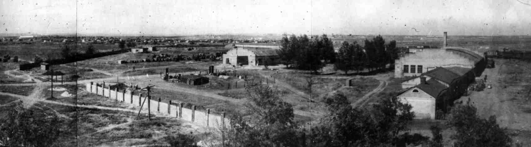 Начало строительства 31 Завода авиационного технологического оборудования